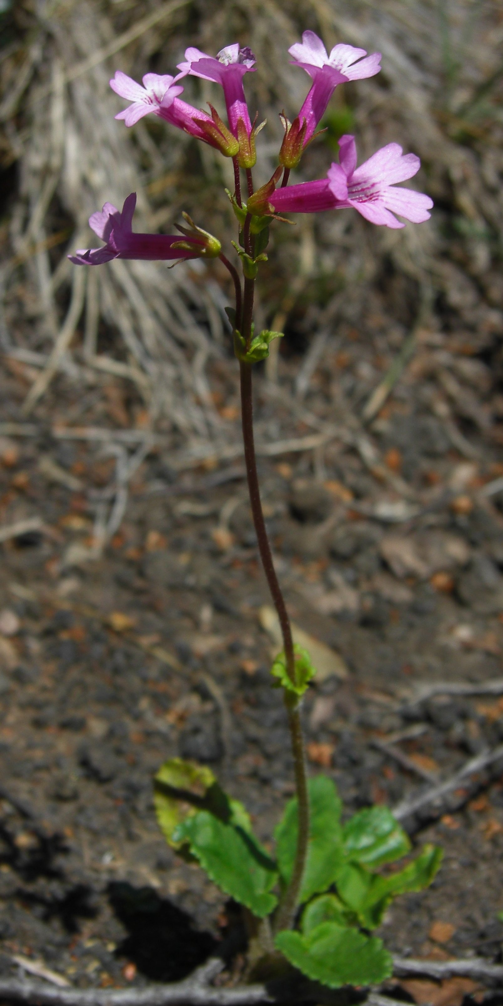 Ourisia alpina Poepp. & Endl. 20081211.10 Volcan Quetrupillan, Chile